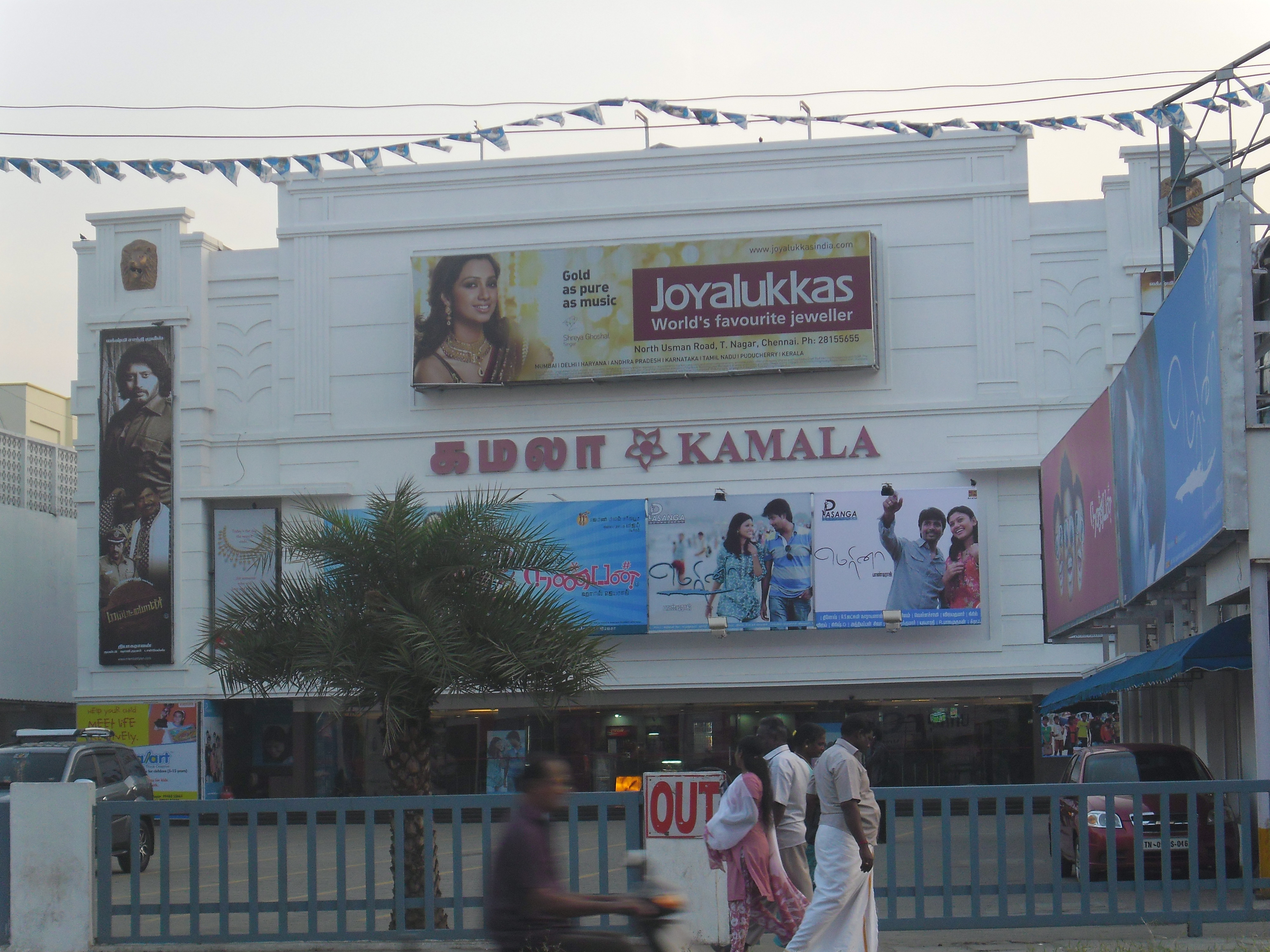 சென்னையிலுள்ள கமலா திரையரங்கம்